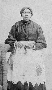 Harriet Powers, folk artist and former slave.